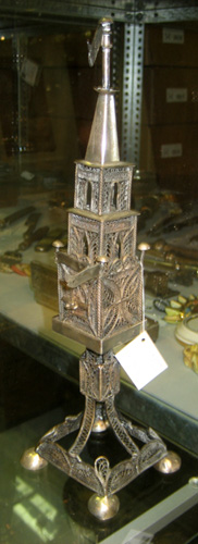 Gewürzbehälter für den Schabbat